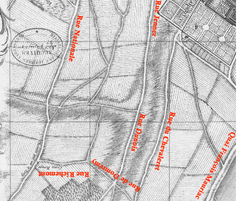 Plan du Quartier de la Gare à Paris en 1762 avec le nom actuel des rues